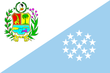 Bandera Municpal de Cumaná (Sucre, Venezuela)